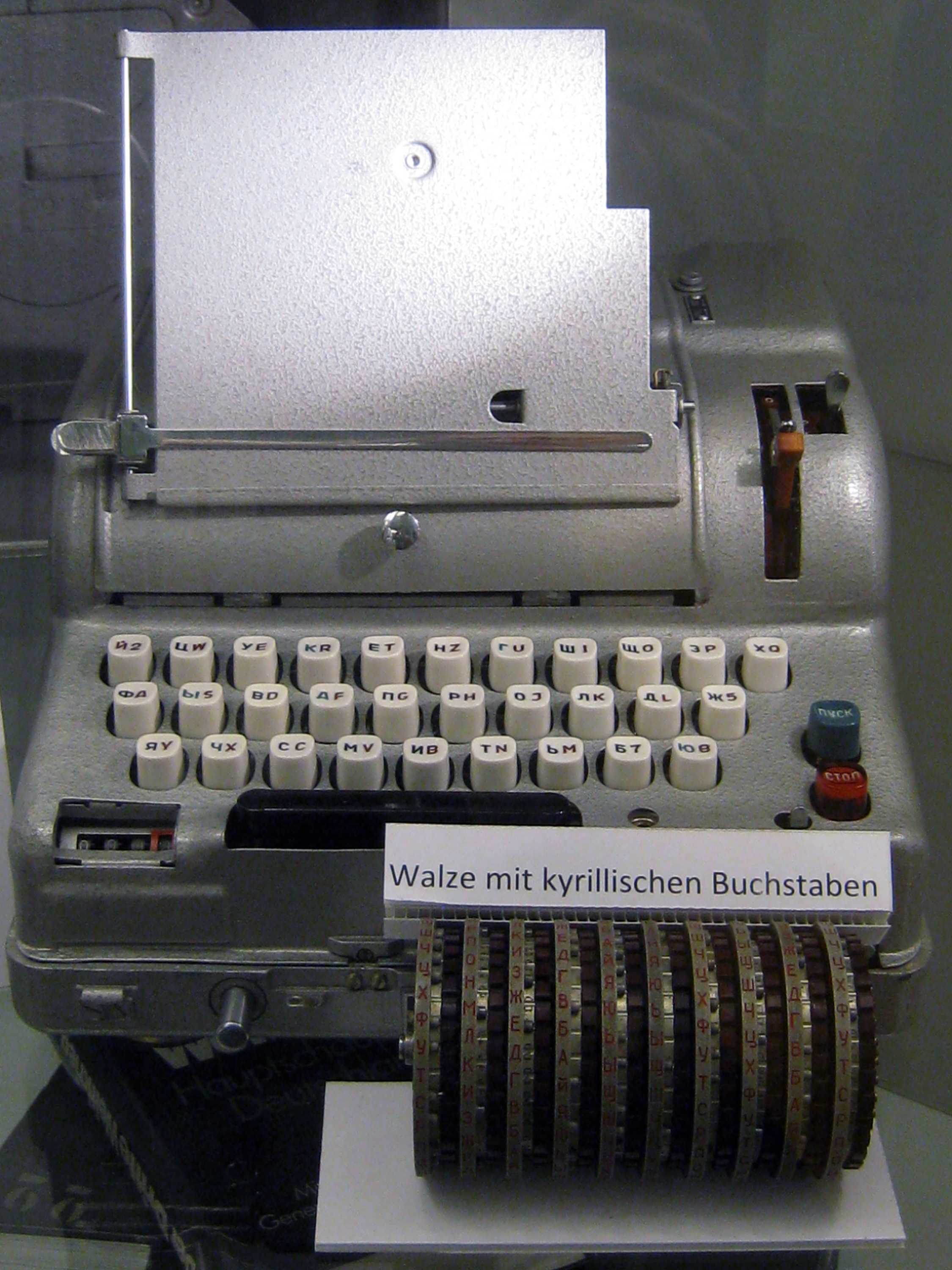 Chiffriermaschine Fialka im Festungsmuseum Reuenthal